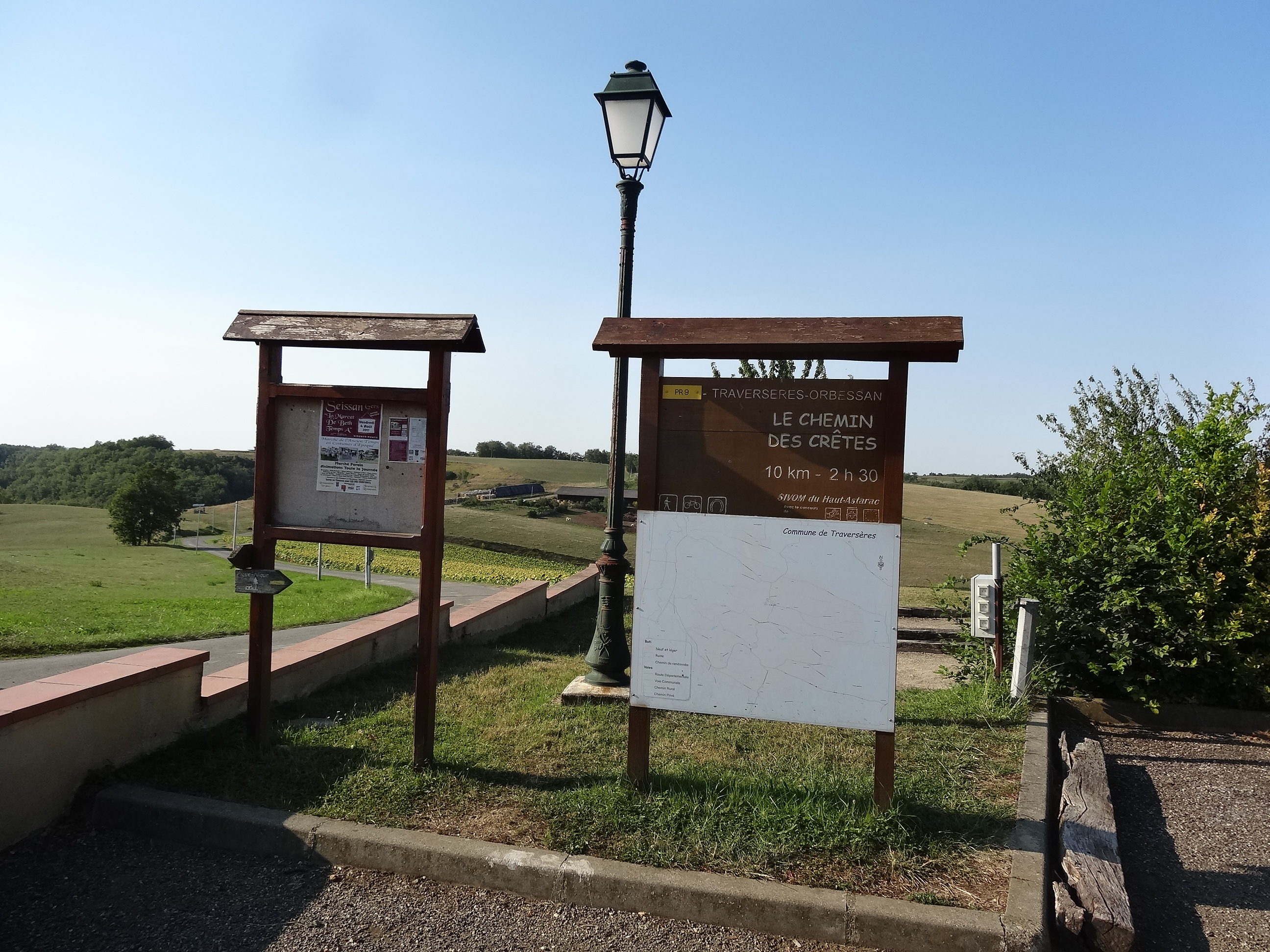 Panneaux explicatifs à Traversères.